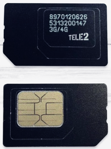 Tele2 simcard